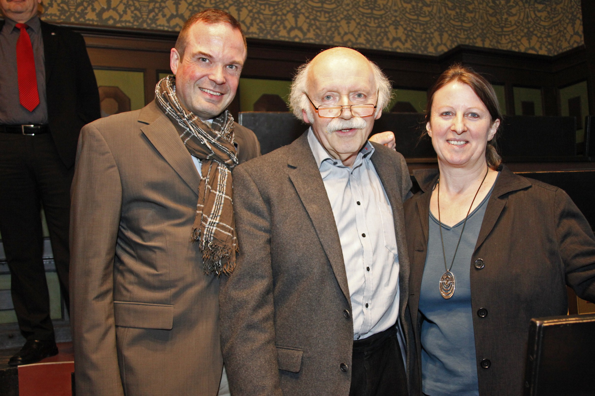 Drei Repräsentanten vom Freundeskreis Hannover, von links: Roger Cericius, 1. Vorsitzender, Erwin Schütterle, 5 Jahre bis 2013 Geschäftsführer, sowie Gil Maria Koebberling, seit 2013 neue Geschäftsführerin ...